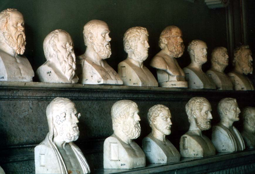 Stanza dei filosofi nei Musei Capitolini di Roma.